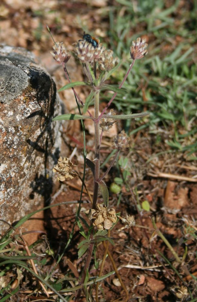 Plantago afra, Wegerichgewächse (Plantaginaceae) - Italien/Italia/Italy: Apulien/Puglia, Prov. Foggia, südöstlich unter Rignano Garganico